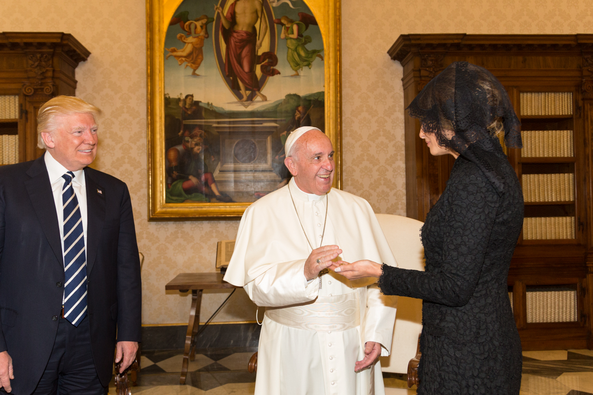 Donald Trump et son épouse Melania en présence du pape François le 24 mai 2017 dans la cité du Vatican.